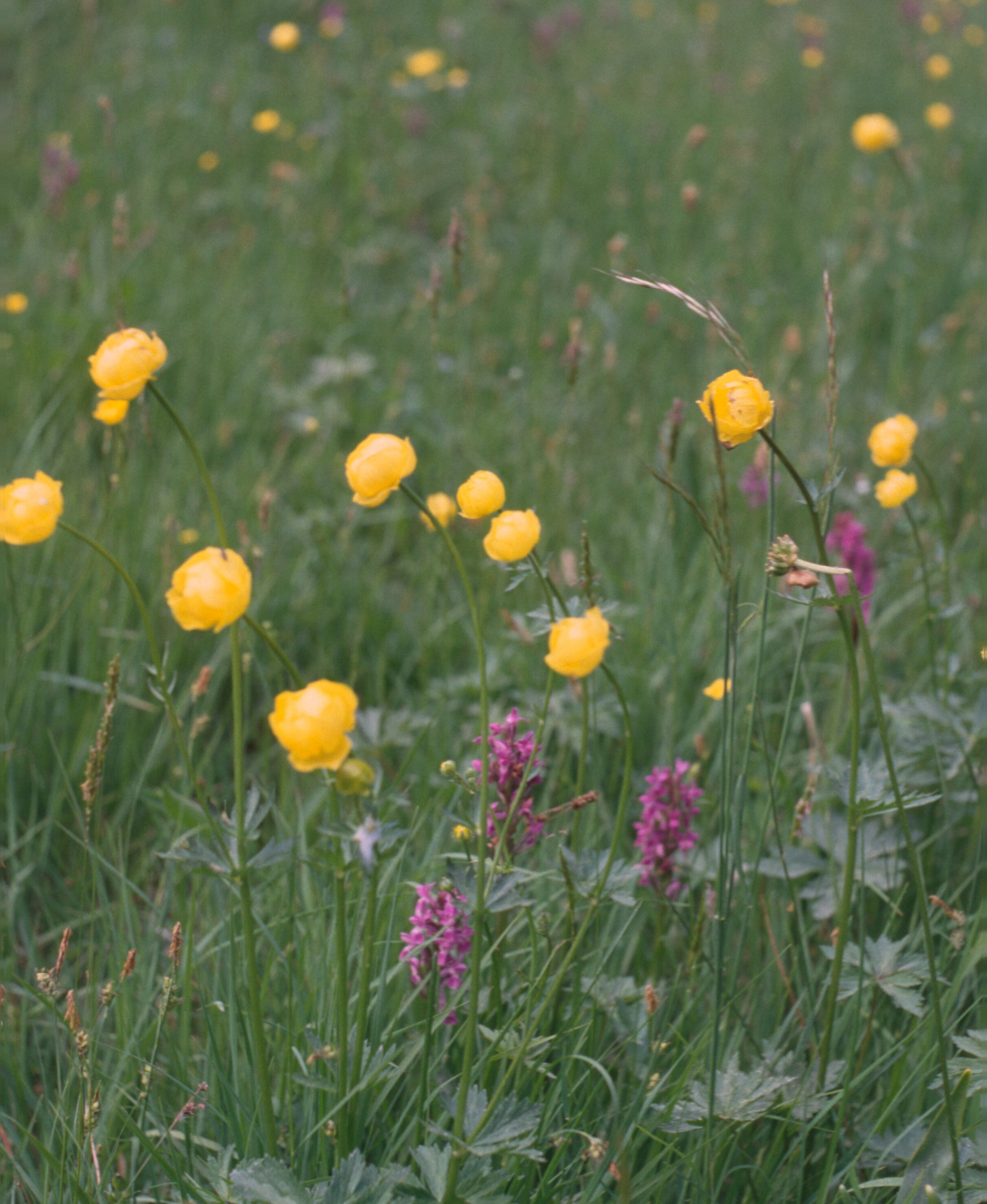 Trollblumen und Knabenkraut im Schönbuch, Wiese im Kayher Tal